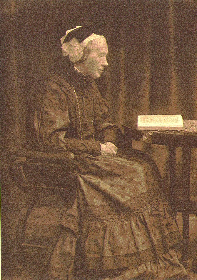 Marie Anna Zarachrias, Hamburger Zeichnerin